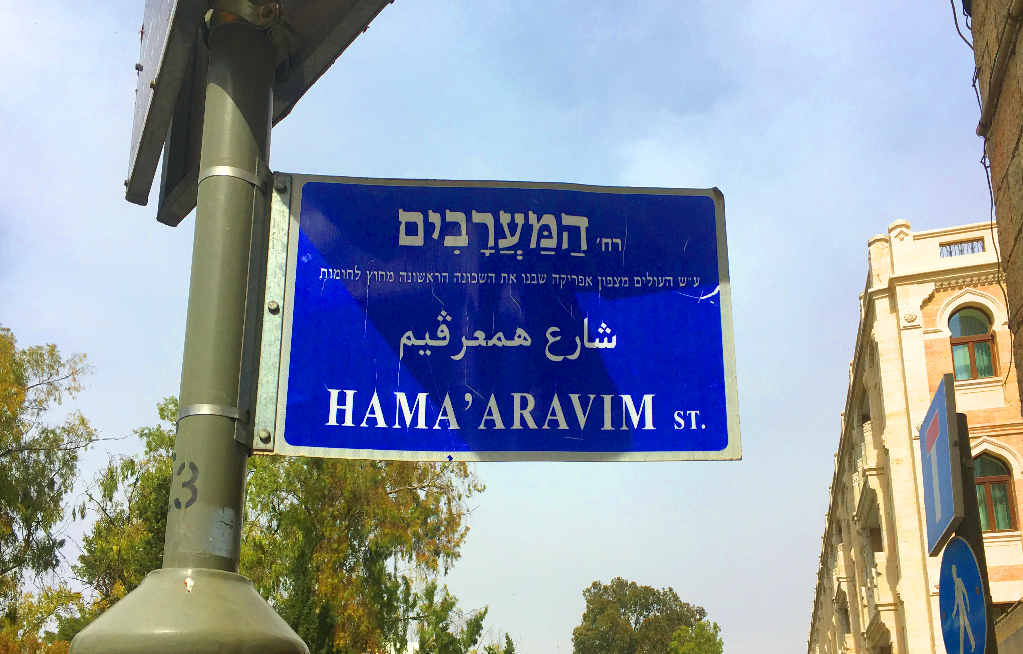 רחוב המערבים, ירושלים